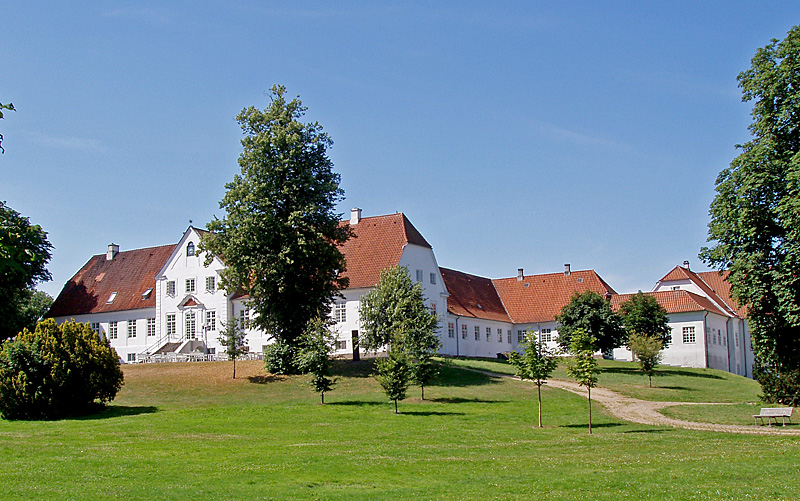 'Dansk: Bygholm, ', er en herregård i Horsens, Nim Herred, Jylland, Danmark. Gården set fra parken. Image taken by me user:Nico-DK / Nils Jepsen